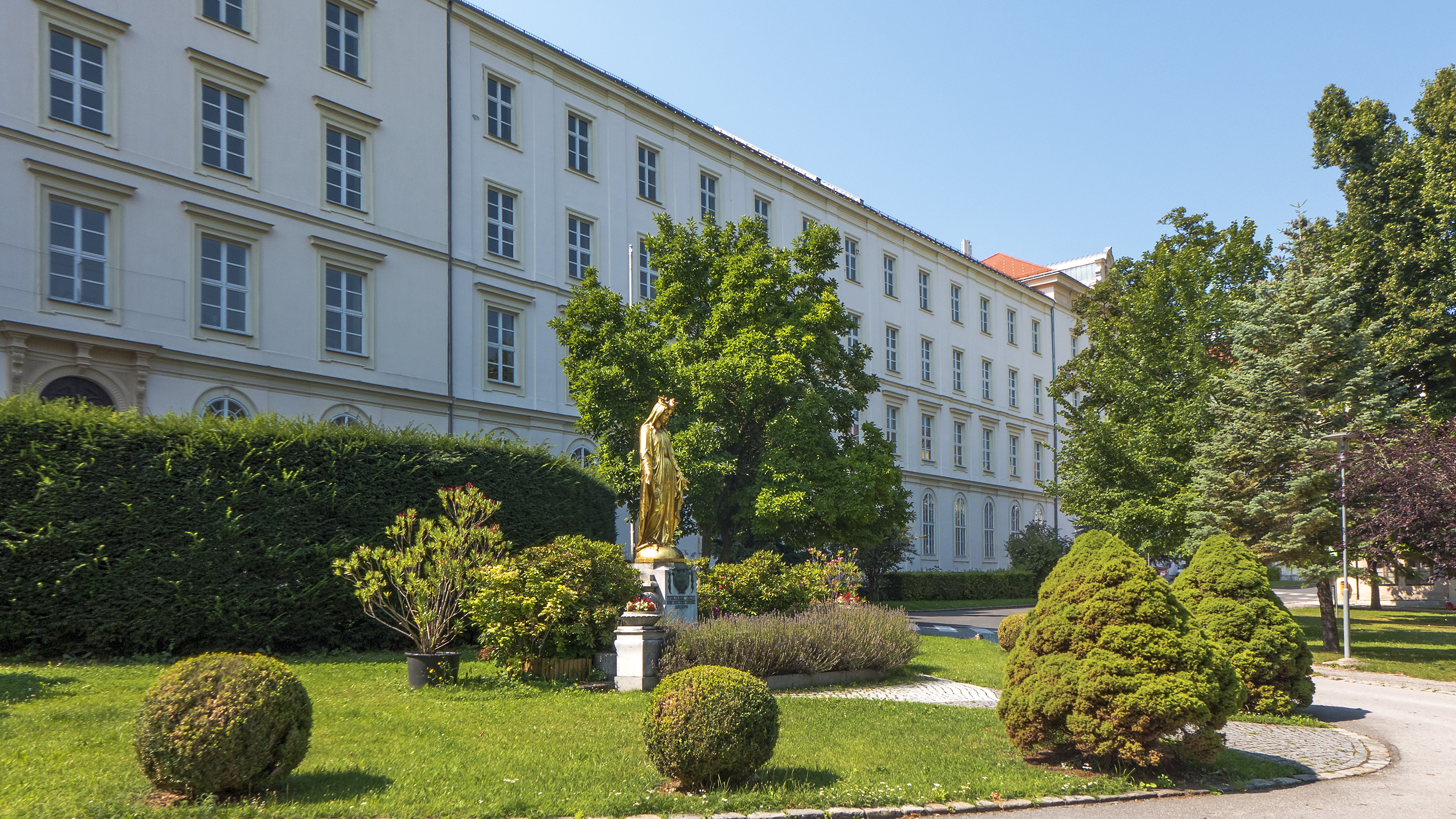 Kollegium Kalksburg in Wien 23